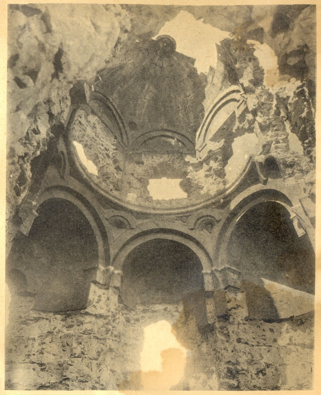 გოგიუბას ეკლესია